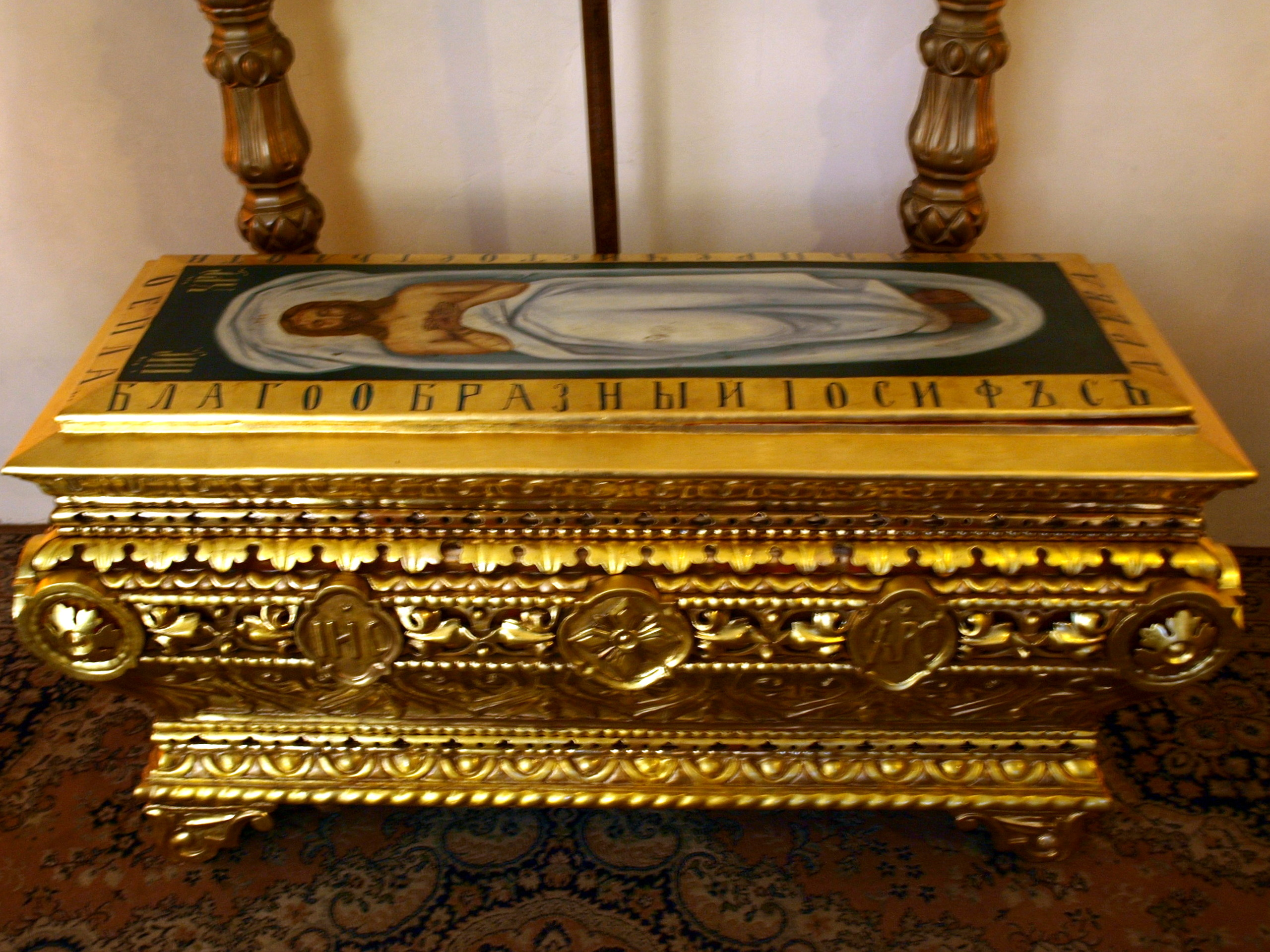 Pravoslavný katedrální chrám sv. Cyrila a Metoděje v Praze